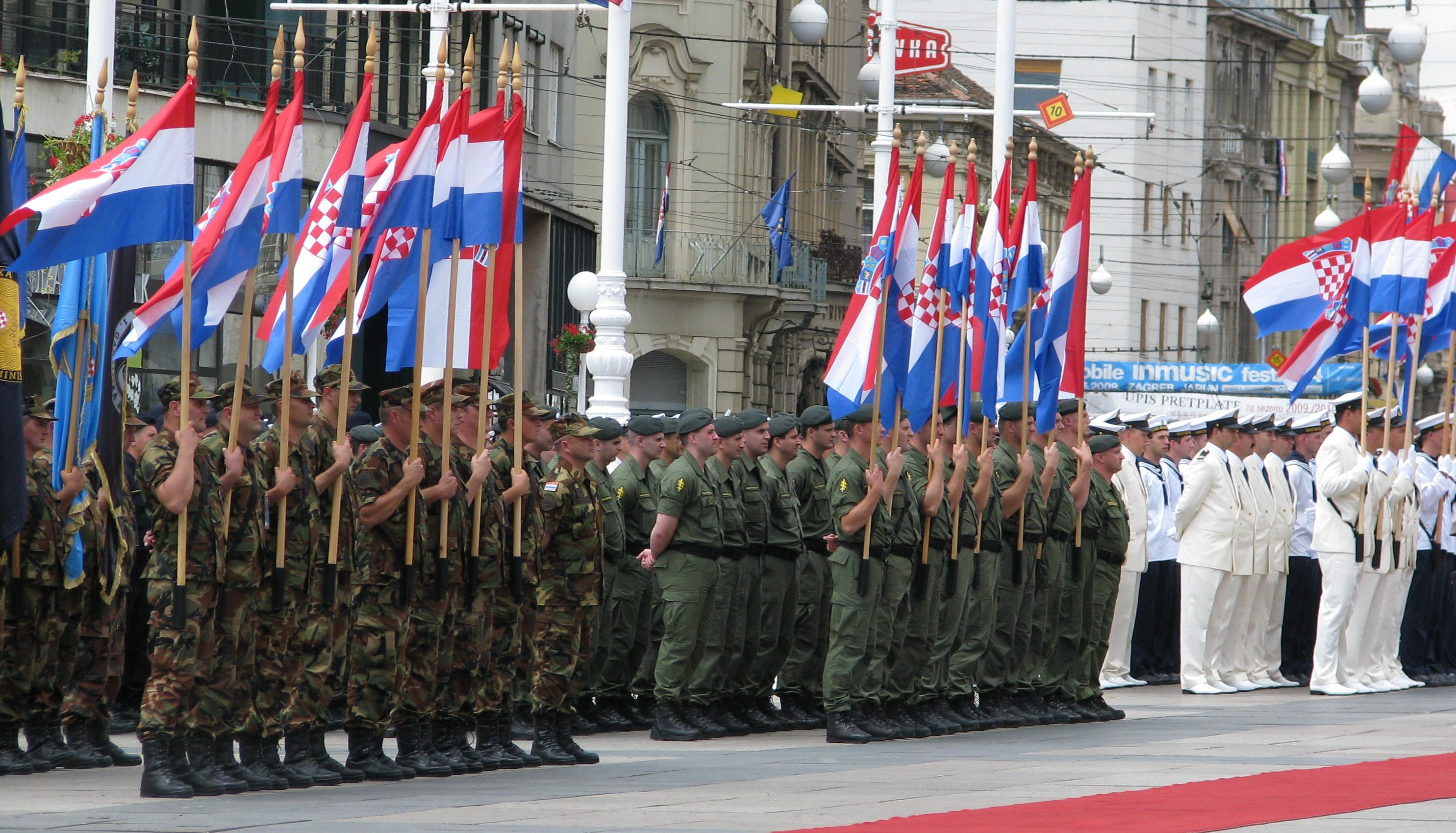 Proslava Dana državnosti u Zagrebu 2009. godine